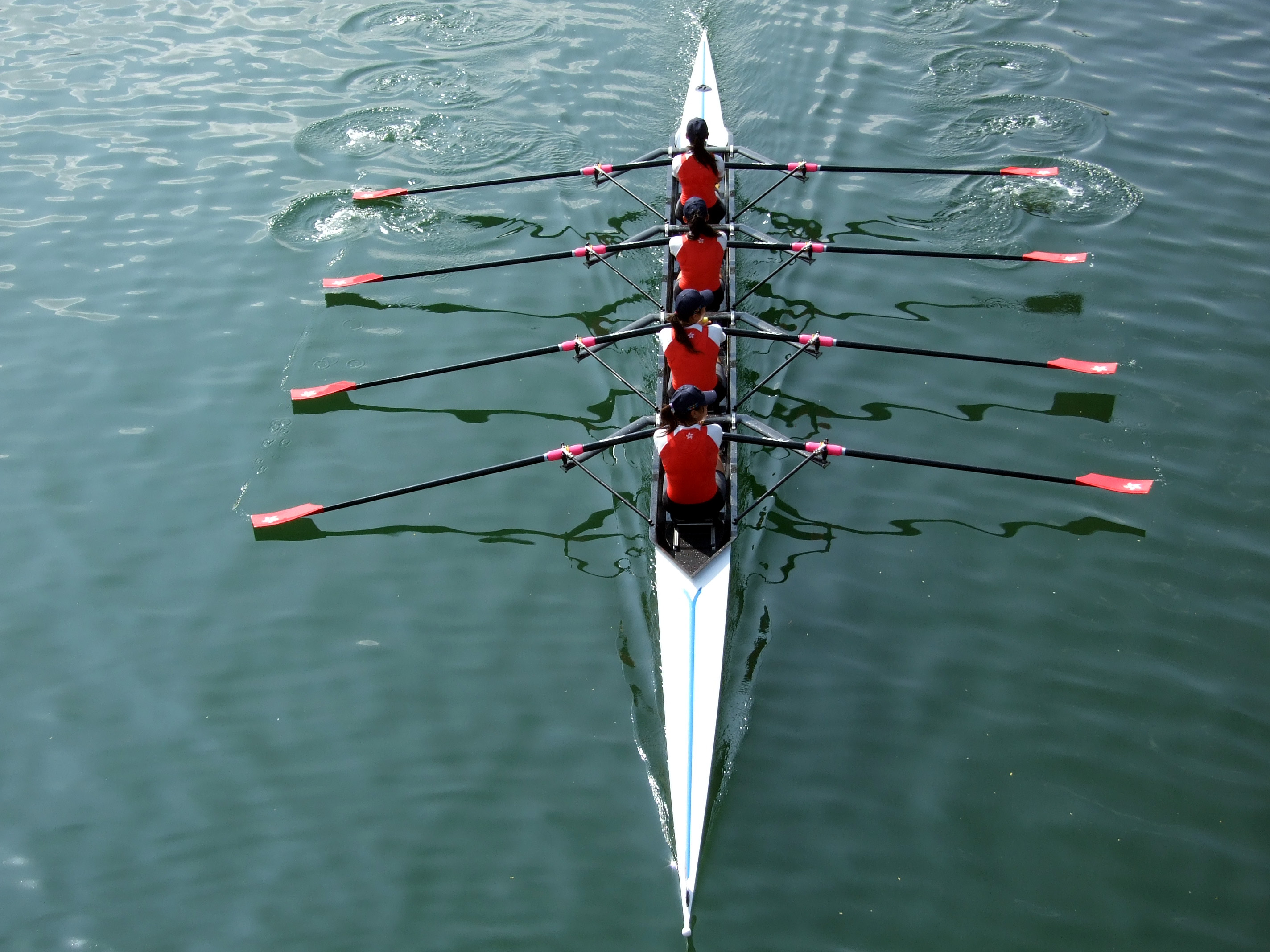 中文（香港）: 2009年東亞運動會香港女子輕量級四人雙槳艇